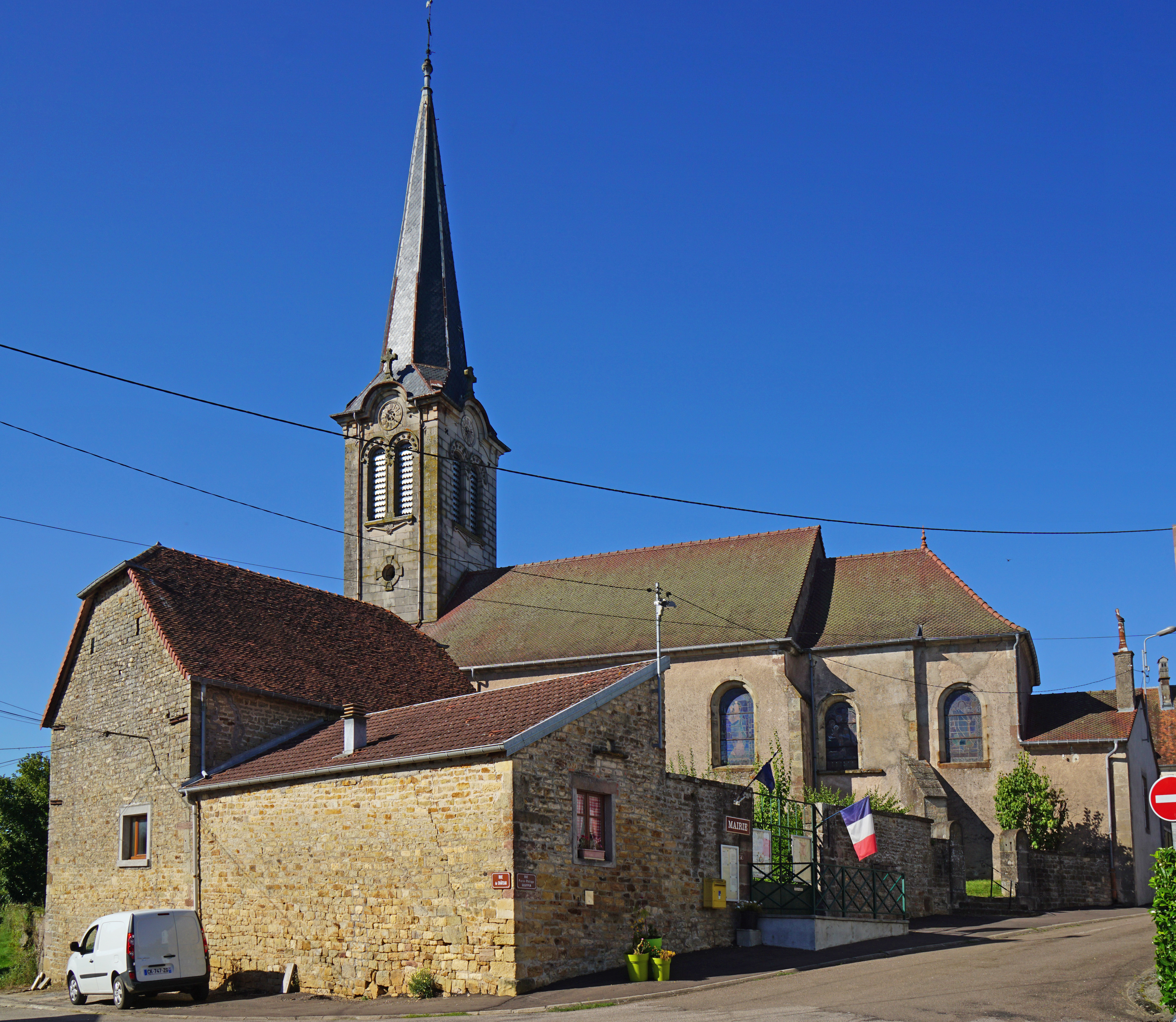 L'église et la mairie de Ainvelle en Haute-Saône.